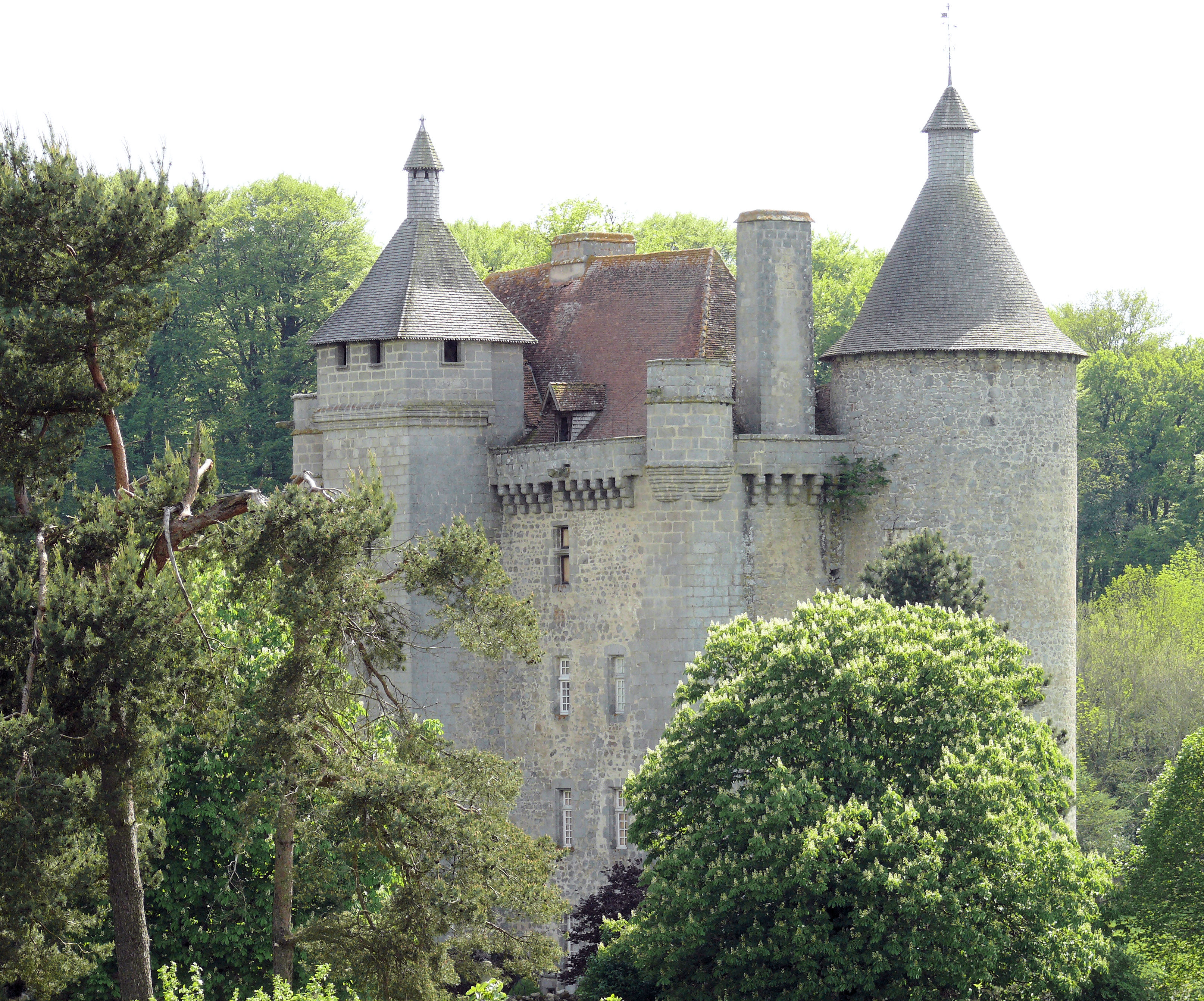 Château de Villemonteix